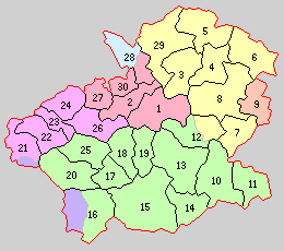 島根県邑智郡の町村制時点の町村。